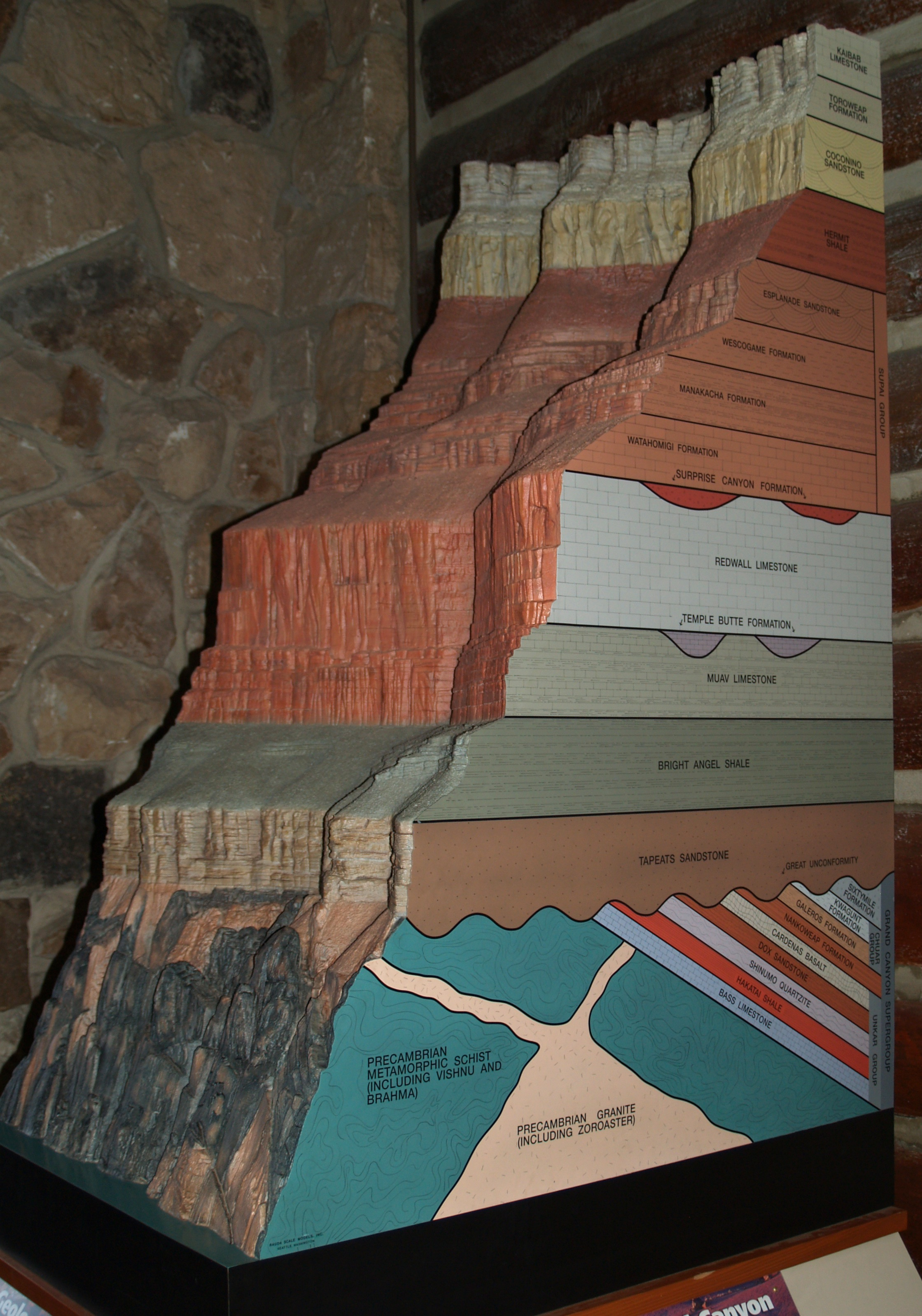 Grand Canyon Lodge. Modelo estratigráfico del Gran Cañón.